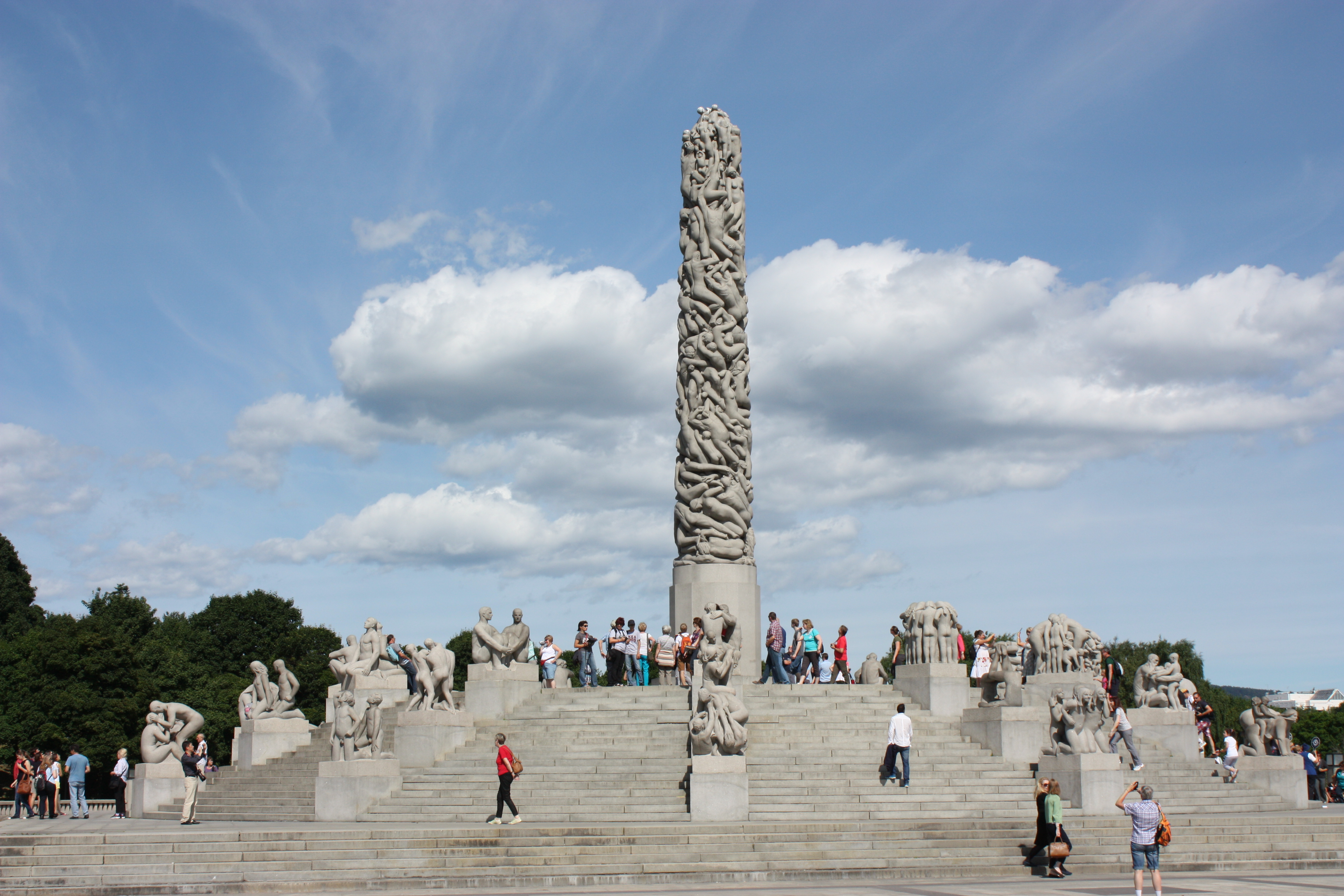 Monolith mit Skulpturen